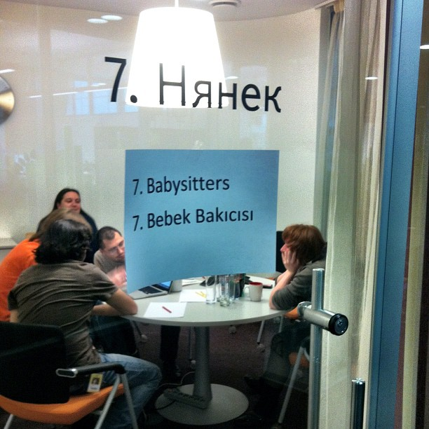 Надпись на двери в офисе "Яндекса"